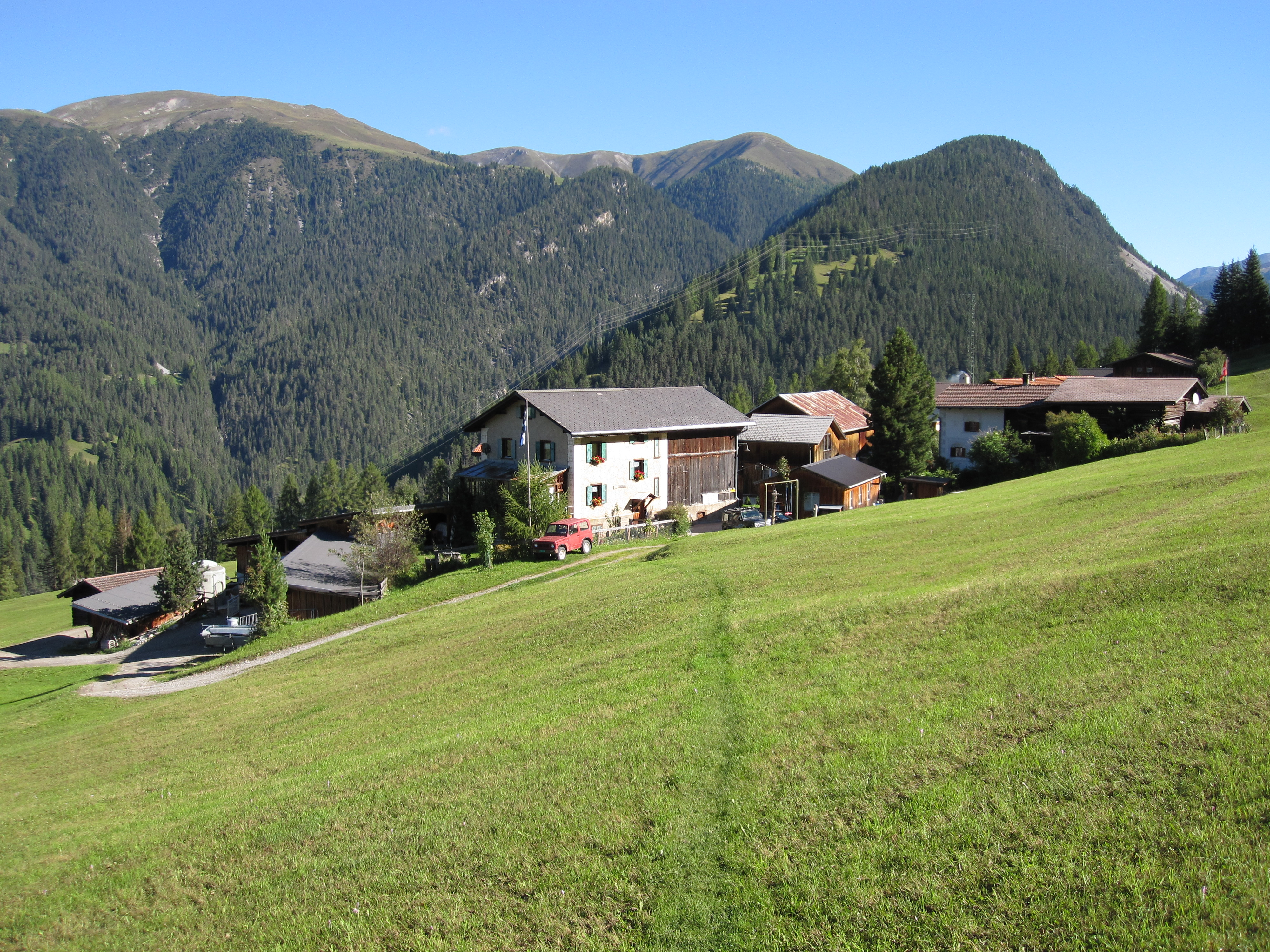 Jenisberg (zu Filisur gehörig) im Kanton Graubünden